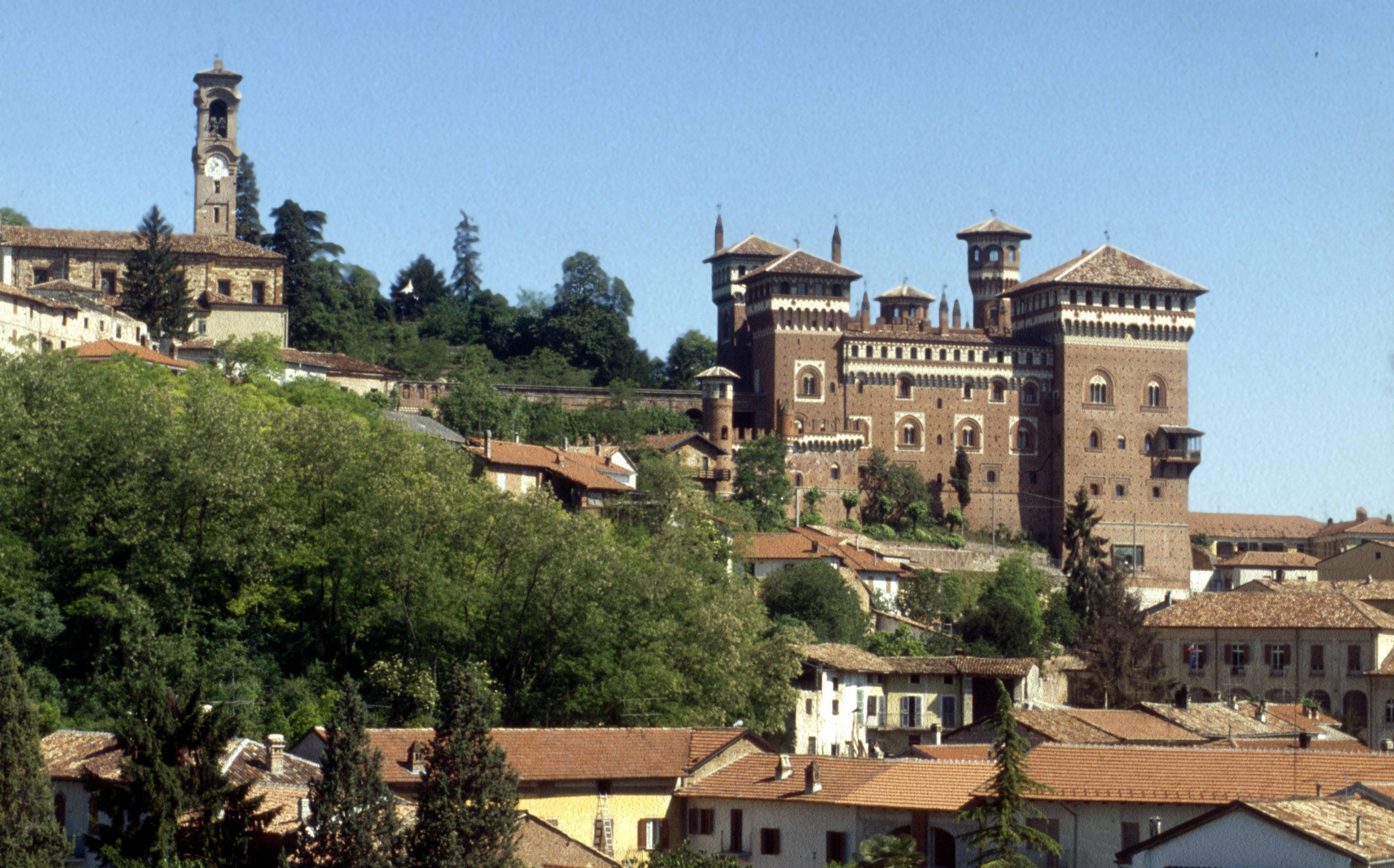 Monferrato